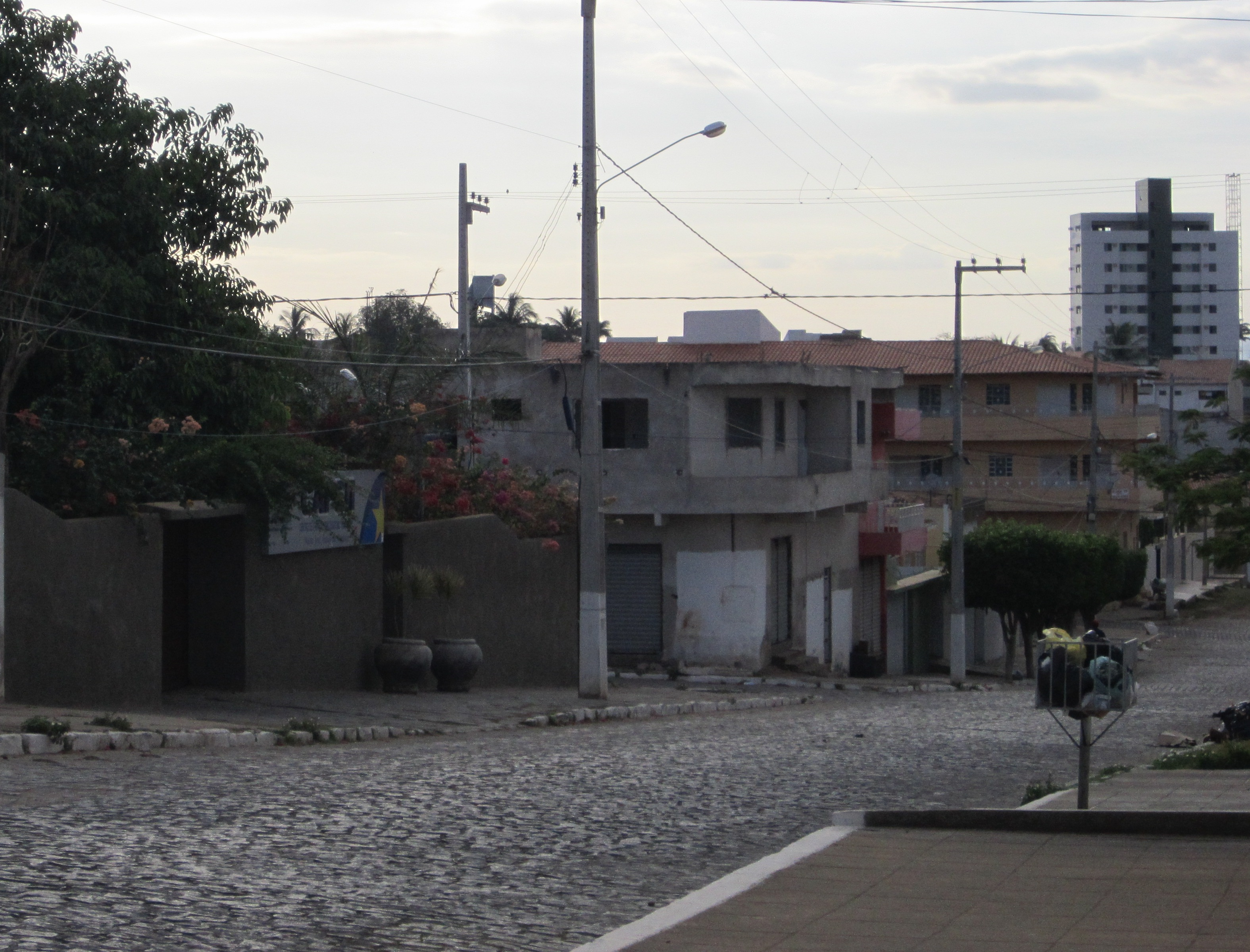 Serra Talhada - Pernambuco - Brasil